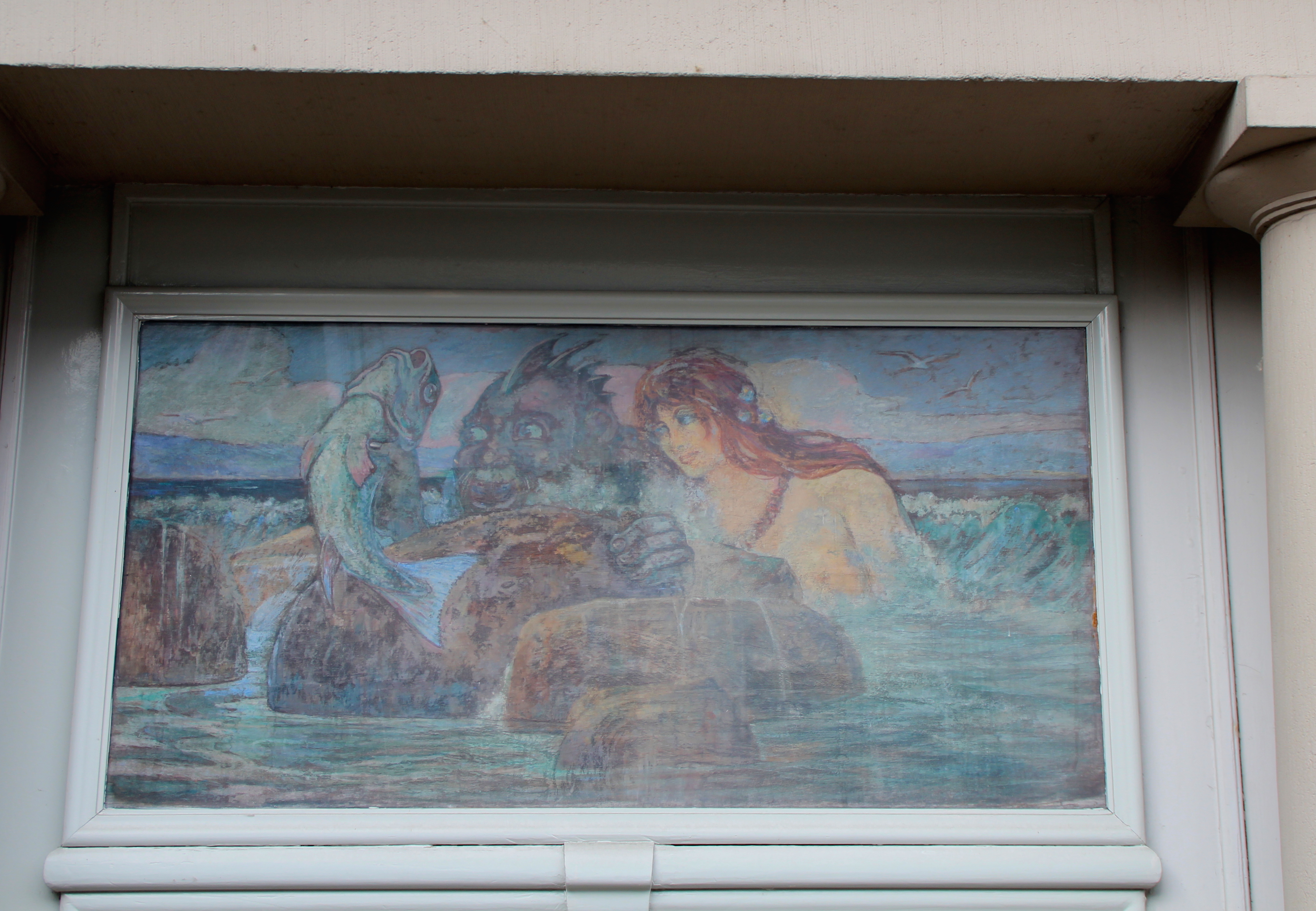 Bild von Seebad von Zollikon